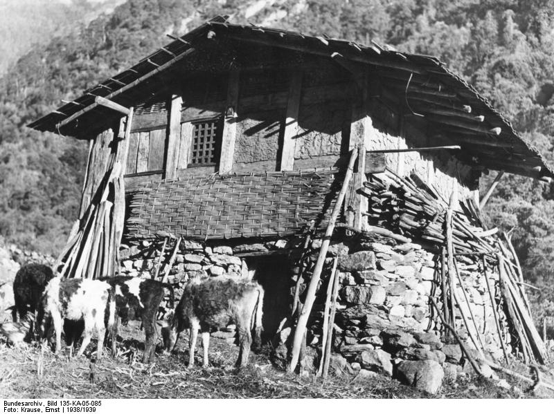 Tibetexpedition, Haus im Lachungtal Lachung, Eingeborenenhaus im Lachung-Tal